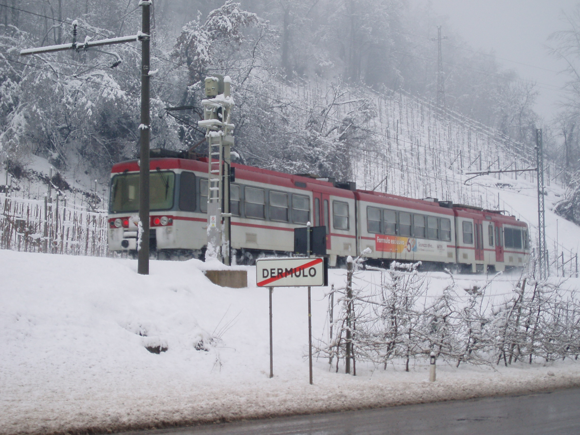 Ferrovia - Dermulo - Taio - Trentino - Italia